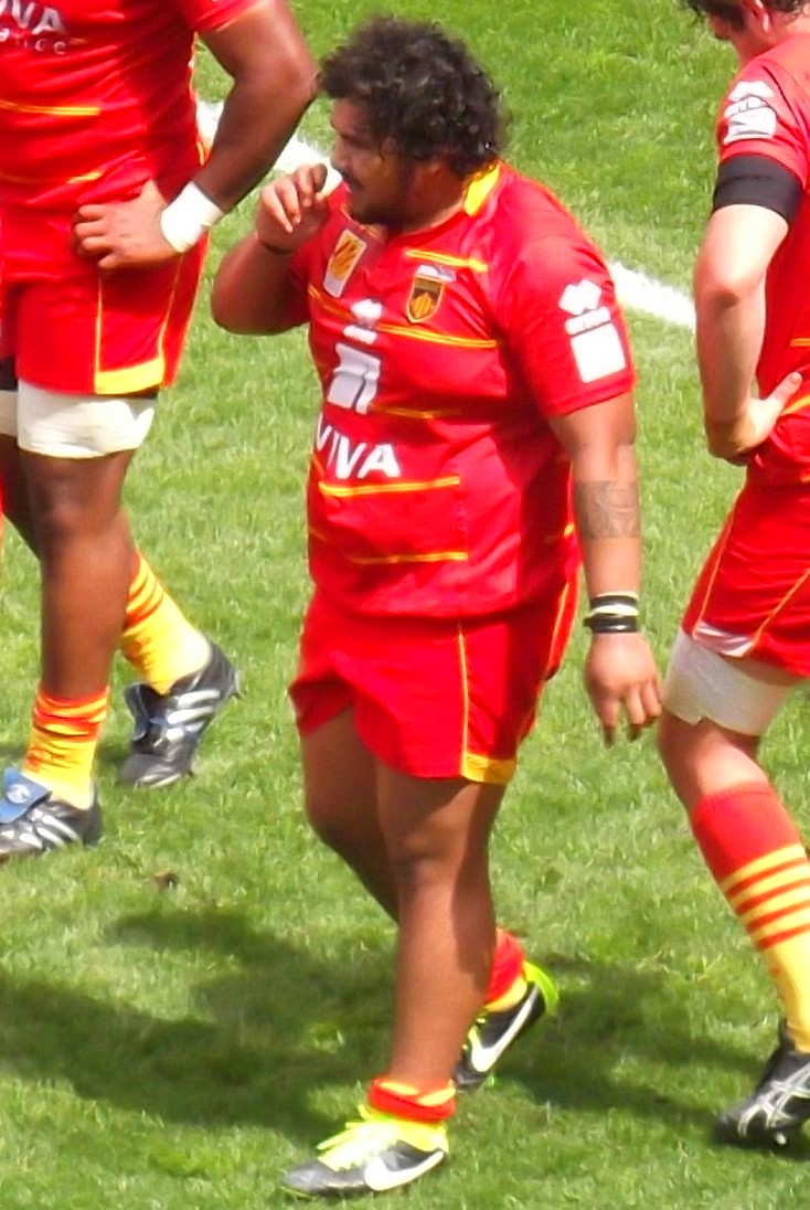 MHR vs USAP, 4 mai 2013.